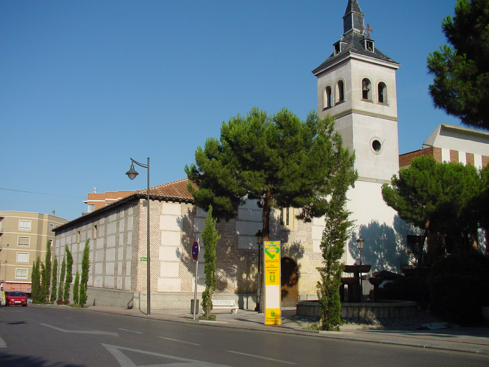 Iglesia en Alcobendas.